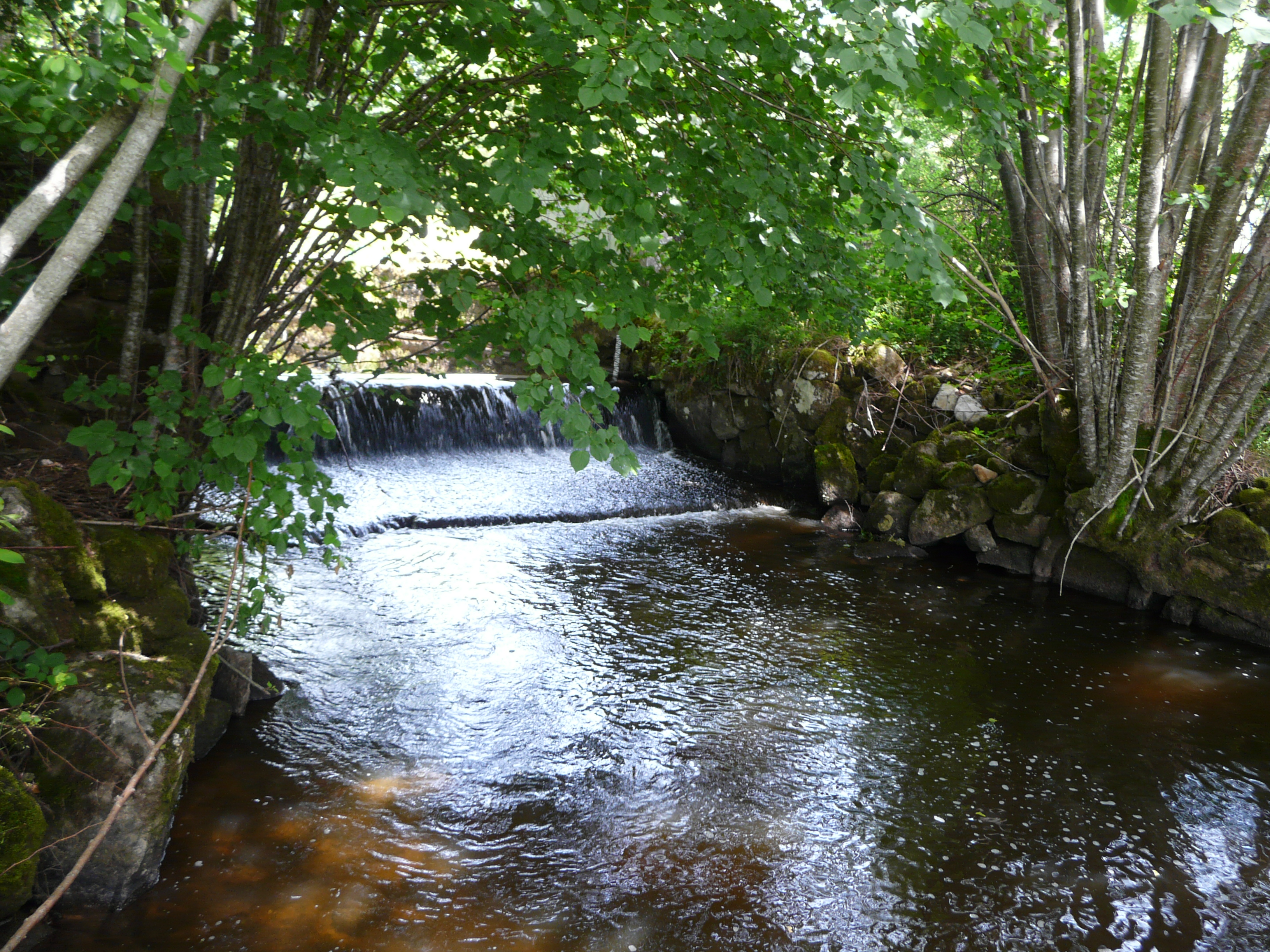 Le Lys au lieu-dit les Plaines, en amont de la route départementale 82, Sarroux, Corrèze, France.